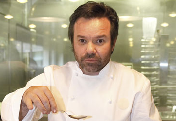 Michel Troisgros